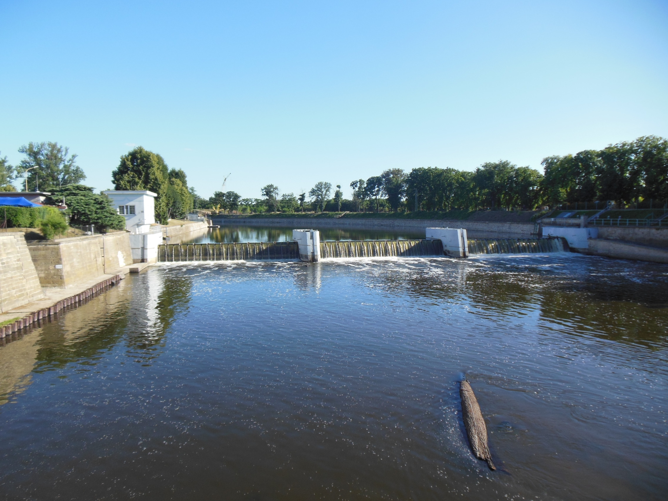 Jez na řece Ohři v Terezíně (okres Litoměřice).